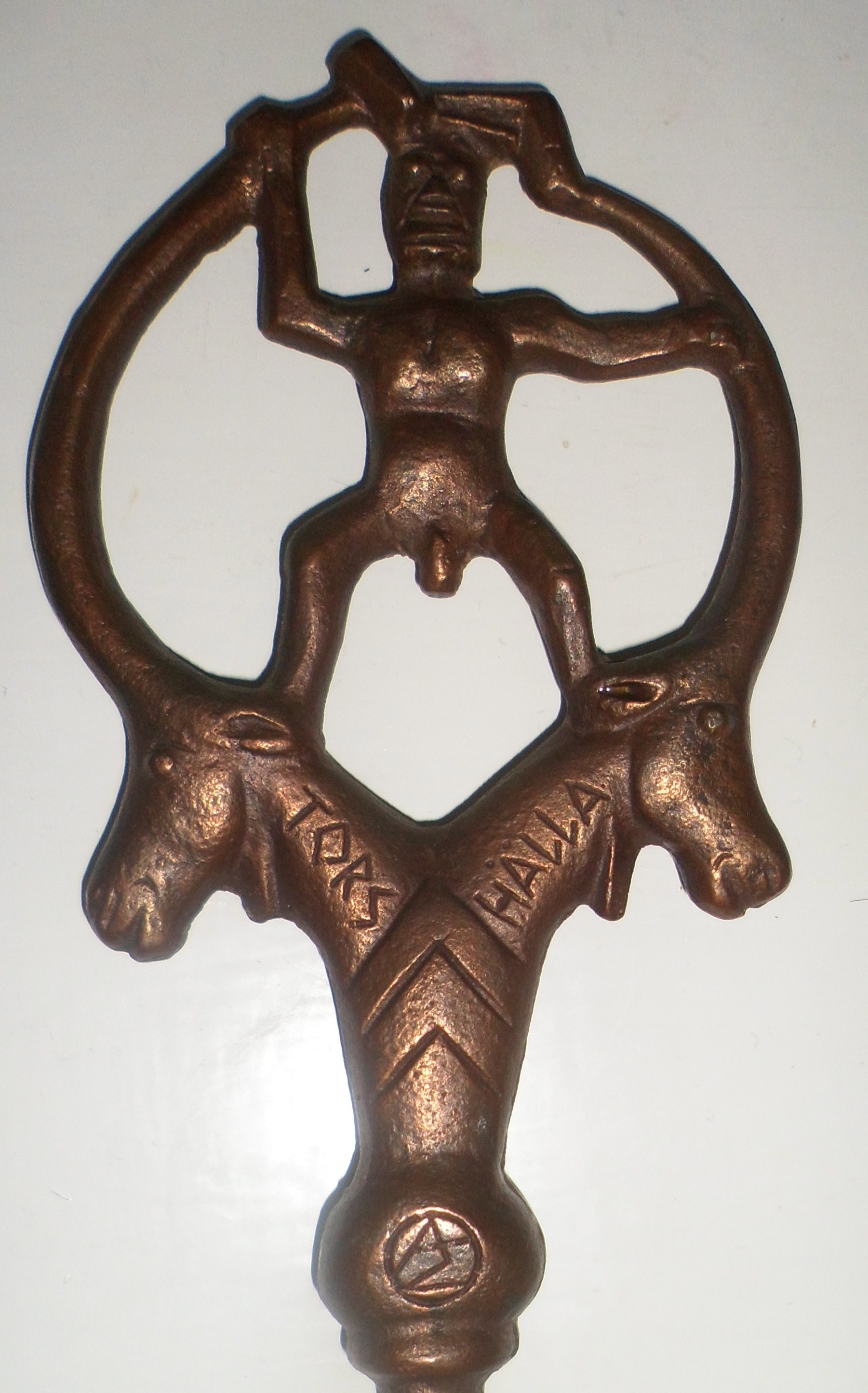 Tor med bockar på Torshälla nyckel, turistsouvenir utformad av Allan Ebeling.